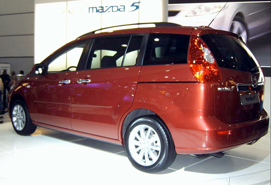 Mazda 5 auf der AMI 2005 in Leipzig.